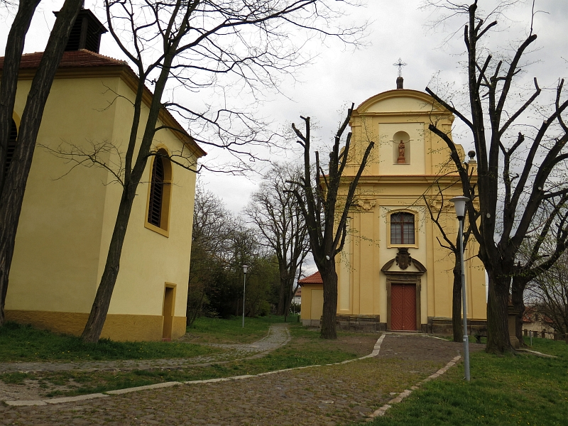 Kostel svatého Václava, Dlažkovice.